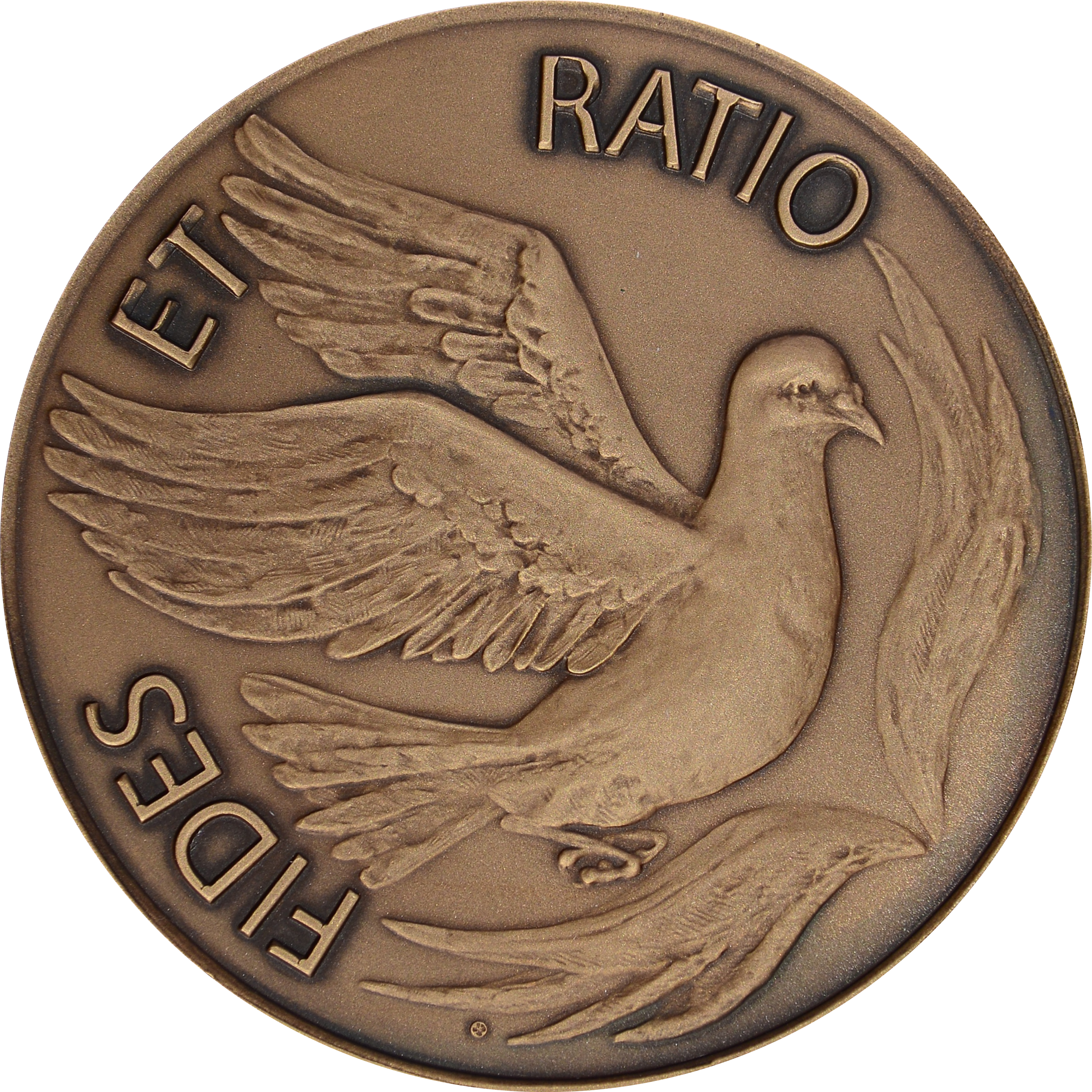 Averz